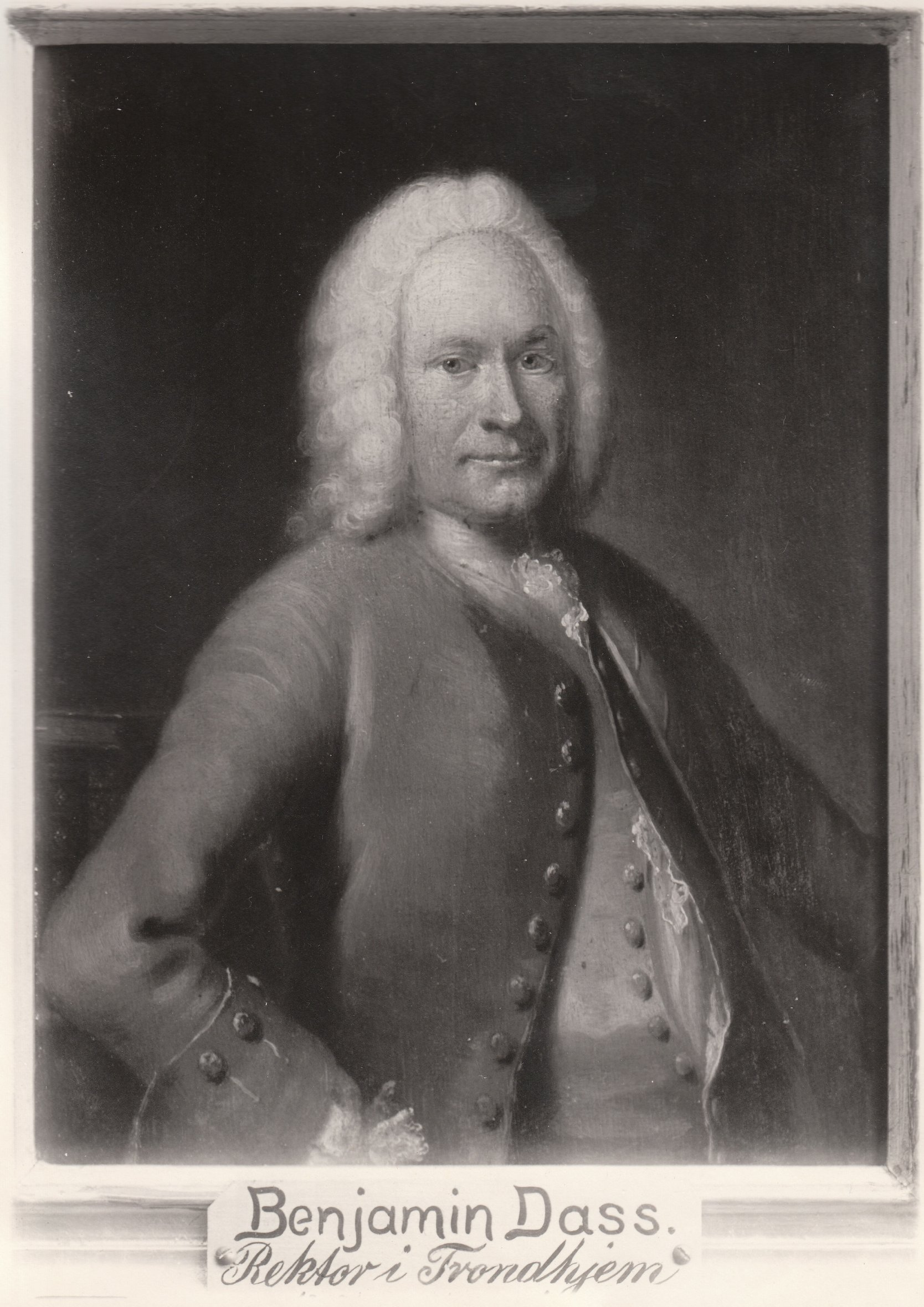 Format: Fotopositiv Fra utstillingen i anledning Trondhjems 900-årsjubileum i 1897. Utstillingstekst i Trondhjems 900 Aars Jubilæum: Katalog for Den Historiske Udstilling i Trondhjem 1897: 748-749. Dass, Benjamin, f. 1706 i Herø (Helgeland), d. 1775 i Kbhavn; Rektor i Trondhjem 1734-51. Ugift. Søn af Jacob Benjaminsen D. (en Brodersøn af den beskjendte Digter og Præst til Alstahaug Petter D.) og Marie Carstensdatter Volqvartz (en Søster af den trønderske Digter Marcus V., d. 1720 som Sognepræst til Ørlandet). Var en særdeles dygtig Skolemand. "Han annammede Trondhiems Skole i en meget slet Tilstand og efterlod den i en ypperlig," siger Suhm. Tog Afsked 1751 og afstod Rektoratet til sin Elev Gerhard Schøning (No.750). Boede fra 1753 i Kjøbenhavn, optaget med videnskabelige Sysler og med at hjælpe sine Venner i Trondhjems med deres litterære Arbeider. Var lærd som faa i vort Land; men har intet udgivet. Hans Bogsamling gik over til Schøning og kom med hans til Videnskabsselskabet. 748. Akvarel (Miniatur) i Sølvramme. *Bergens Billedgalleri. 749. OM., Brystbill. i Kabinetsformat, malet paa Egeplade. * Videnskabsselskabet .